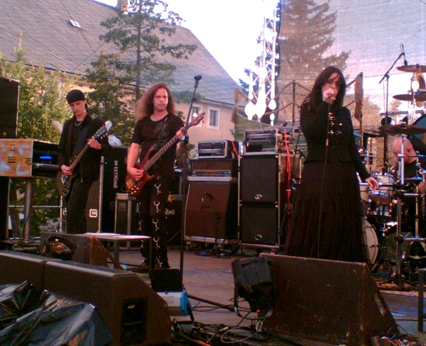 Xandria